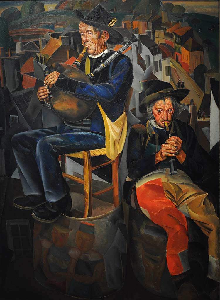 Б.Григорьев. Pipe Players. «Бретонские волынщики (Крестьяне, играющие на дудках)». 1924